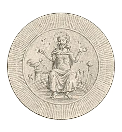 La Sainte Hostie envoyée en 1433, par le pape Eugène IV, à Philippe le Bon, duc de Bourgogne.